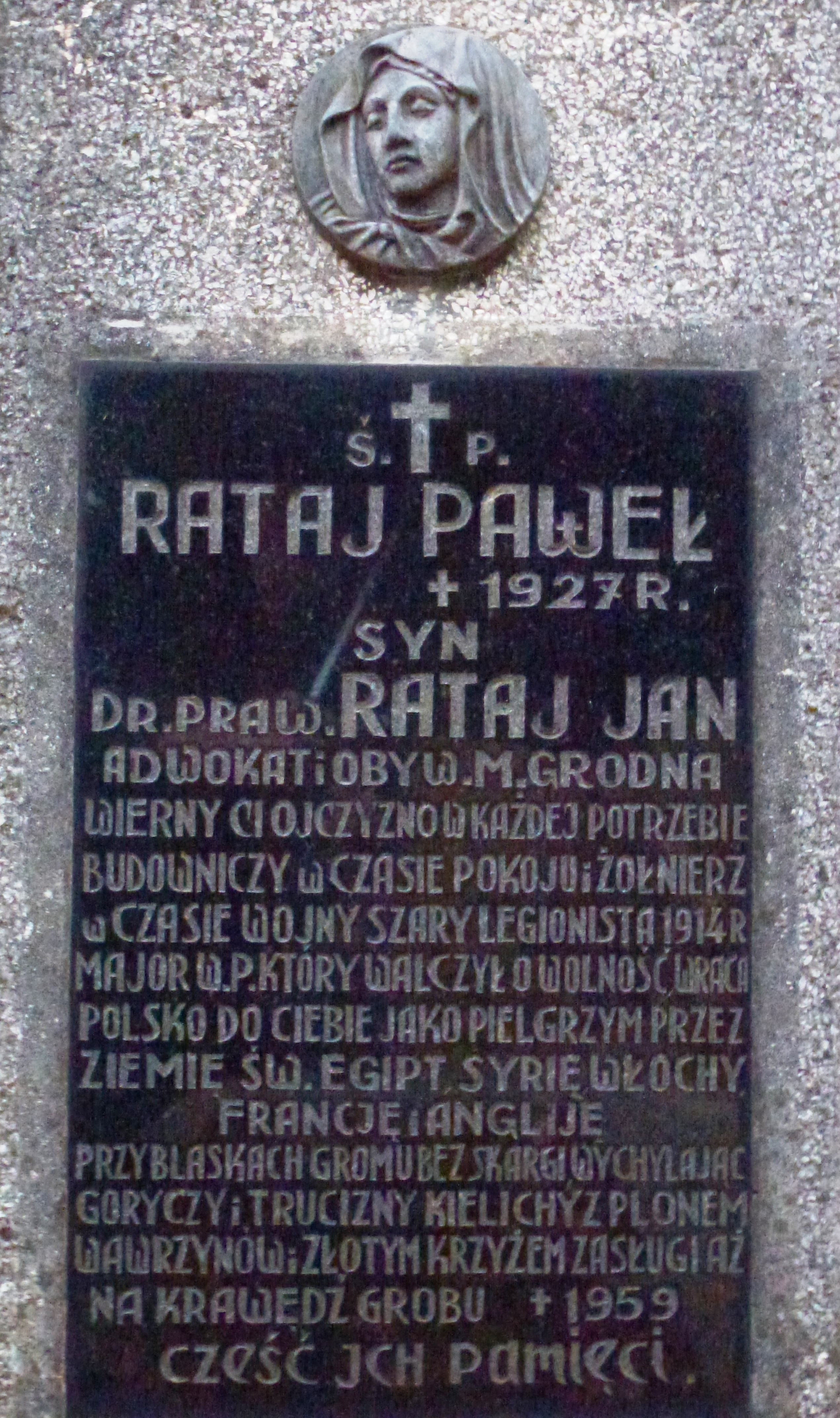 Tablica nagrobna Jana Rataja znajdująca się na cmentarzu przy ul. Orackiej w Bochni (kwatera 15)